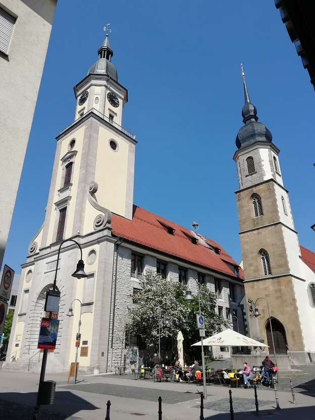 Links Rathausturm, rechts Liebfrauenkapelle